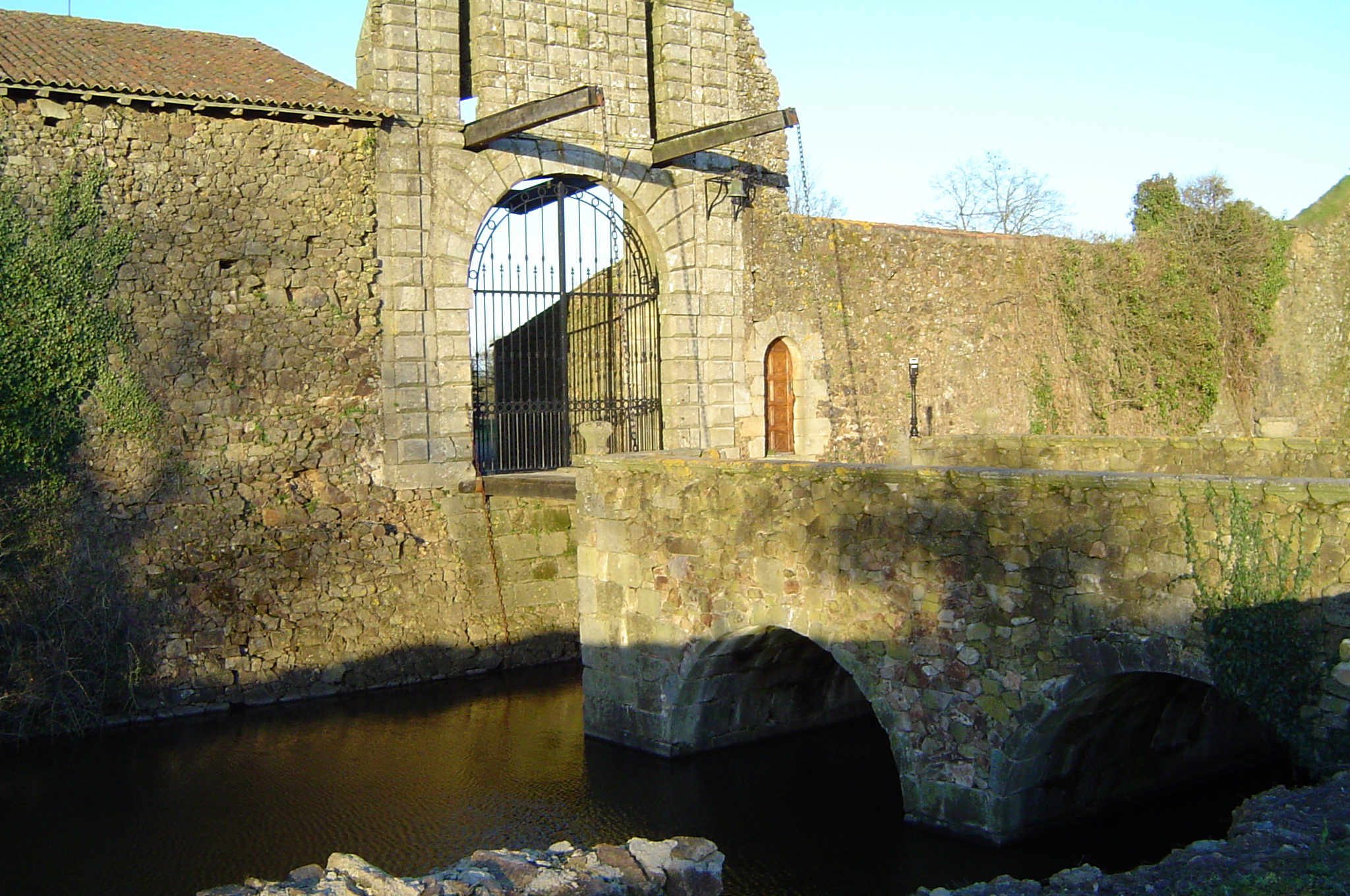 Portail du château de la Sévrie. Situé en Anjou jusqu'à la Révolution, ce château est maintenant sur le territoire de Saint-Aubin-de-Baubigné (aujourd'hui rattachée à la commune de Mauléon, dans les Deux-Sèvres, en France).